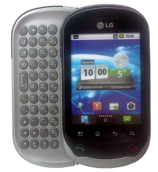 Le LG Optimus Chat affiché à la boutique Koodo Mobile.